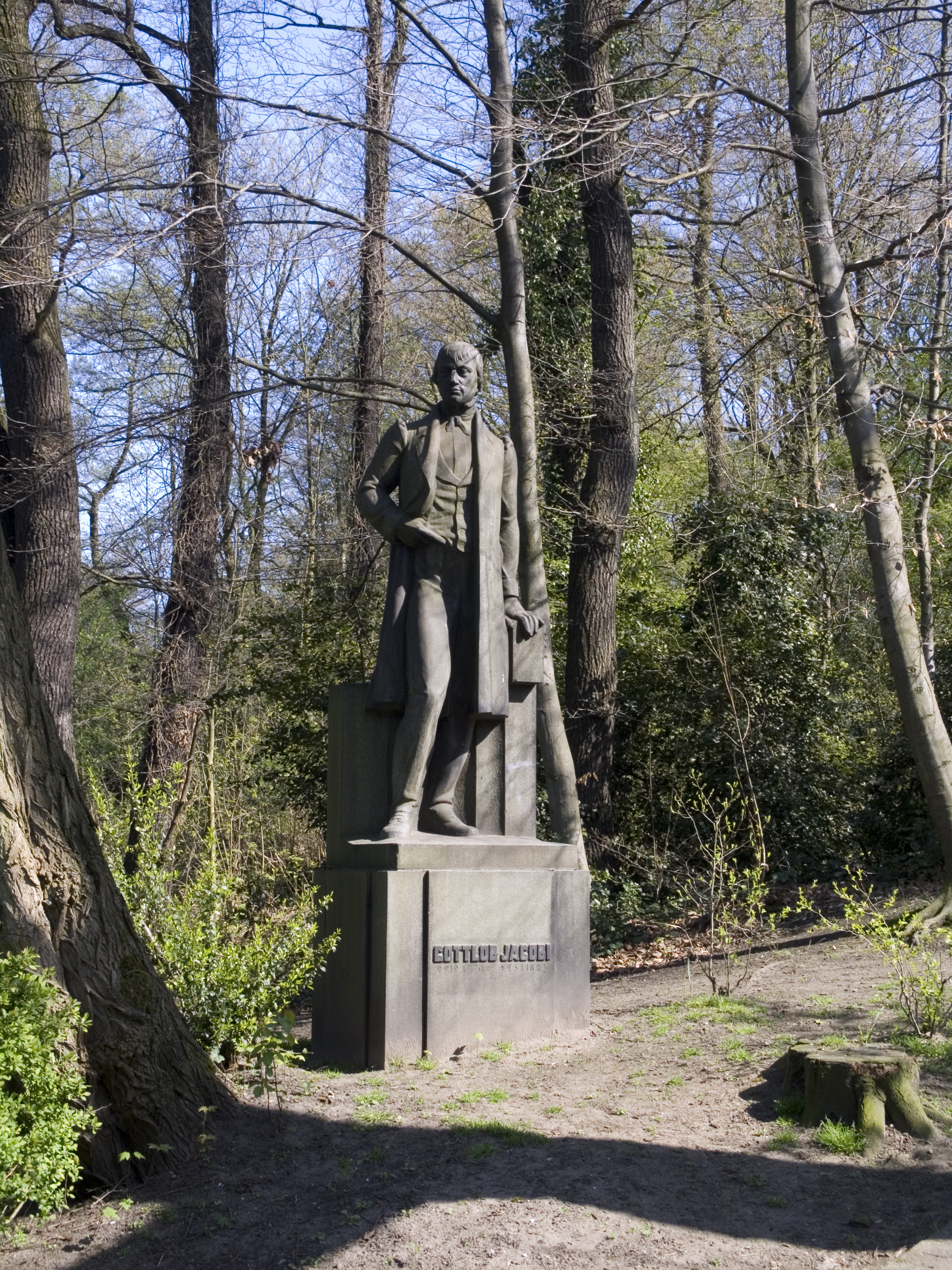 Северный Рейн - Вестфалия, Оберхаузен - Металлургический завод Святого Антония, памятник Готтлобу Якоби